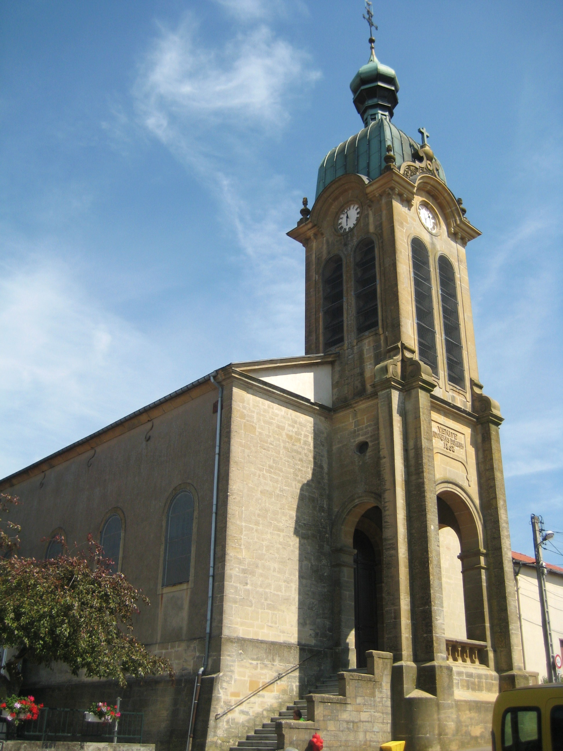 Église paroissiale Saint-Paulin, Anoux